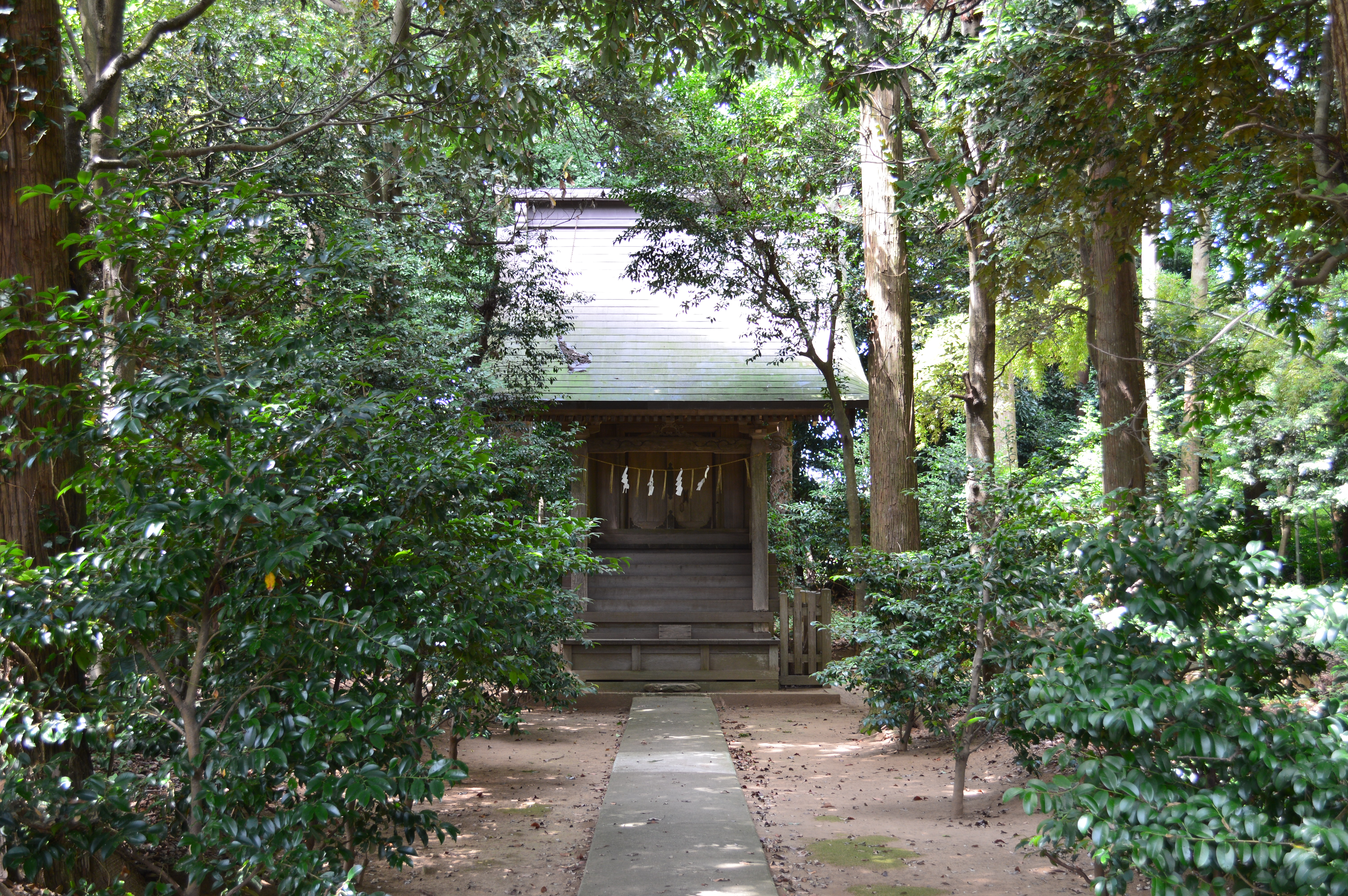 鹿島神宮境外摂社 跡宮 (正面より)